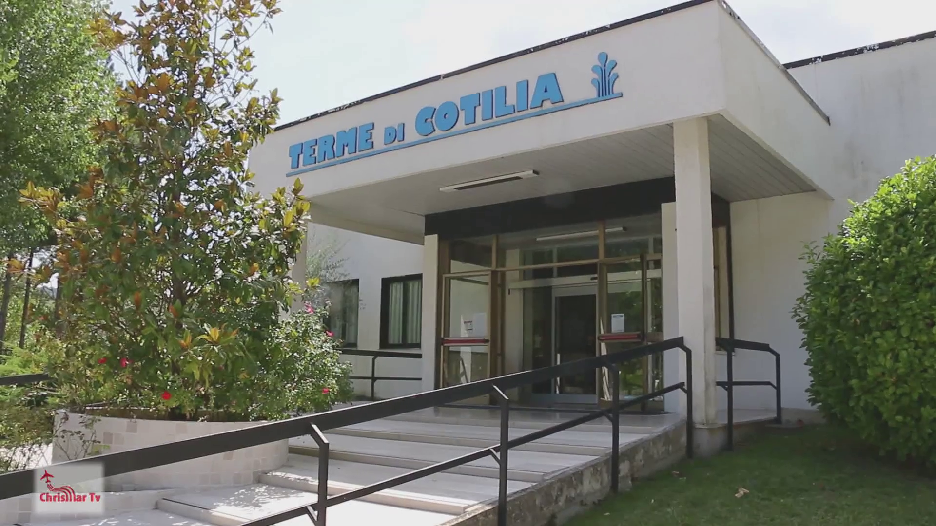 Il villaggio termale di Cotilia, in provincia di Rieti (Lazio)